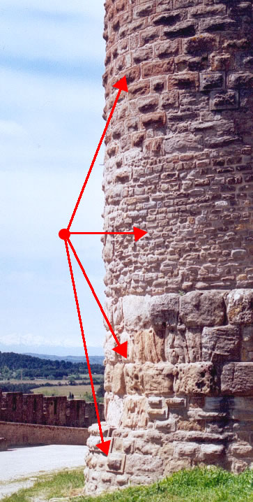 Détail d'une tour de la Cité de Carcassonne pour visualisation des différentes époques de construction, avec pour chaque époque, des appareils de différentes taille. Auteur : notafish L'image originale (sans les commentaires) est disponible